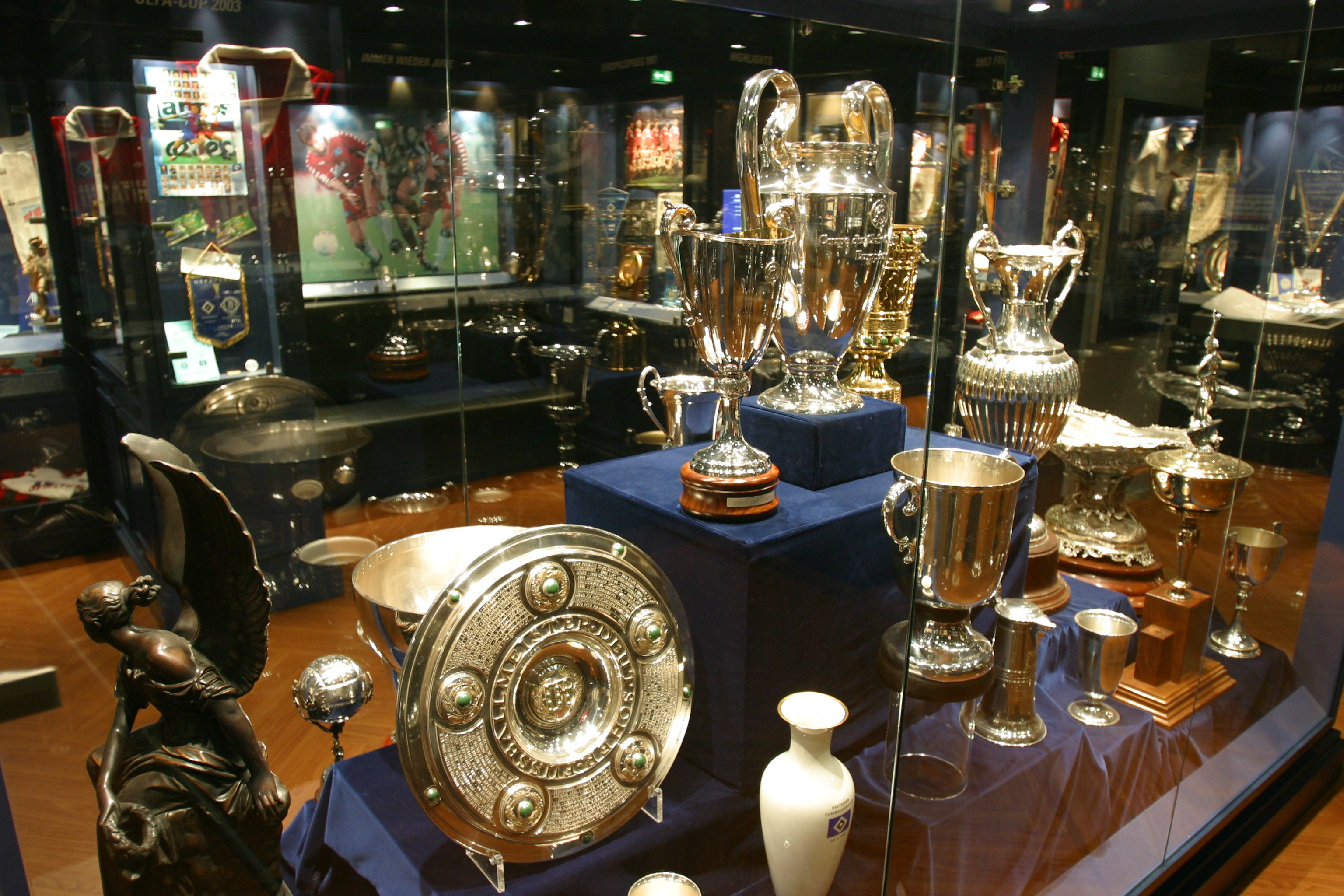 Pokalvitrine im HSV Museum, Bild nicht zur Weitergabe ohne Genehmigung freigegeben.